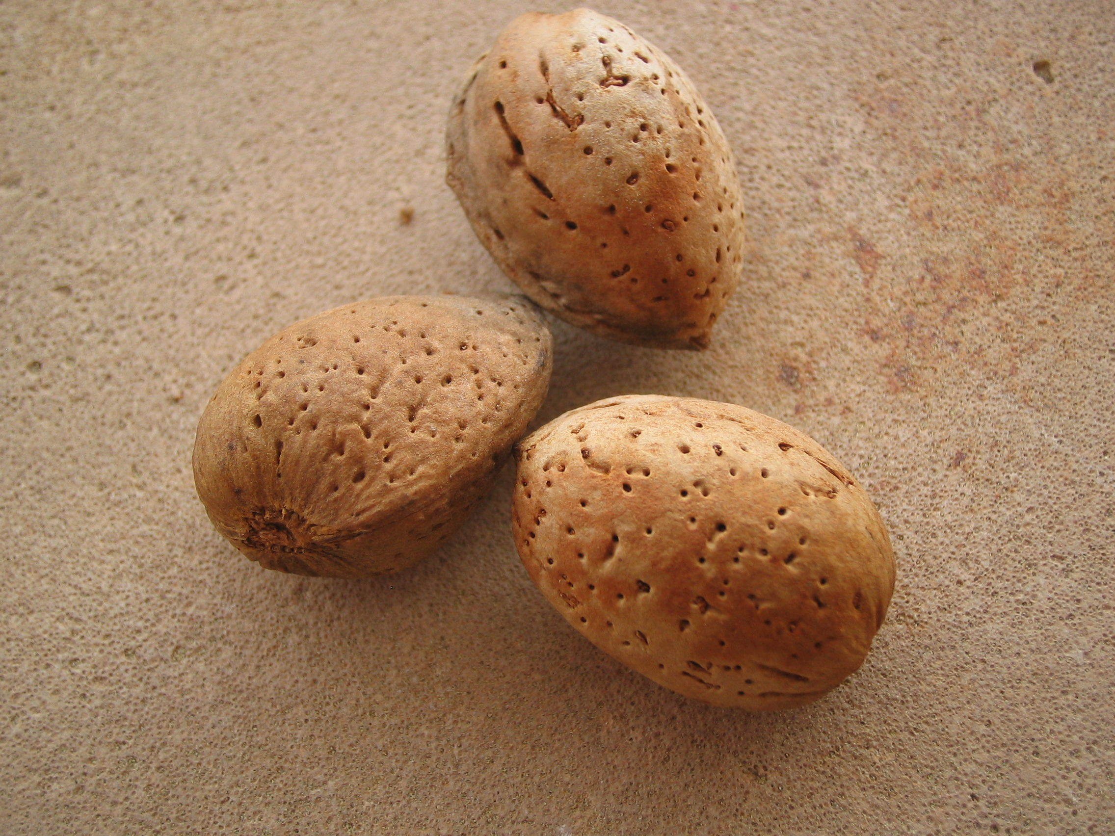 Almonds